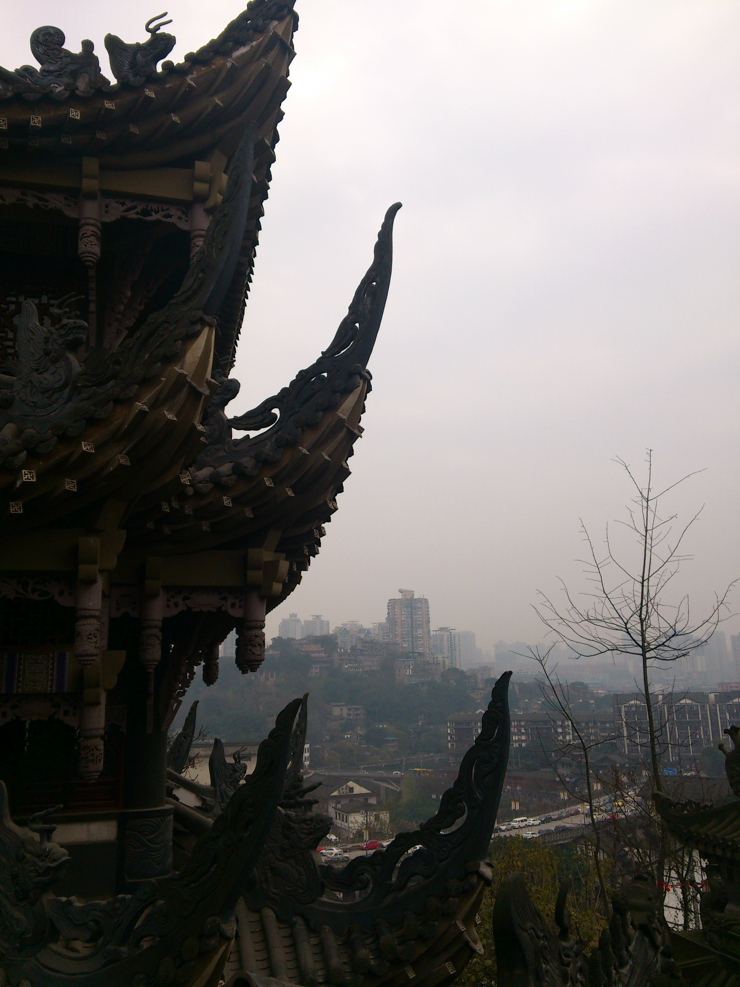 中文（中国大陆）: 宝轮寺一瞥